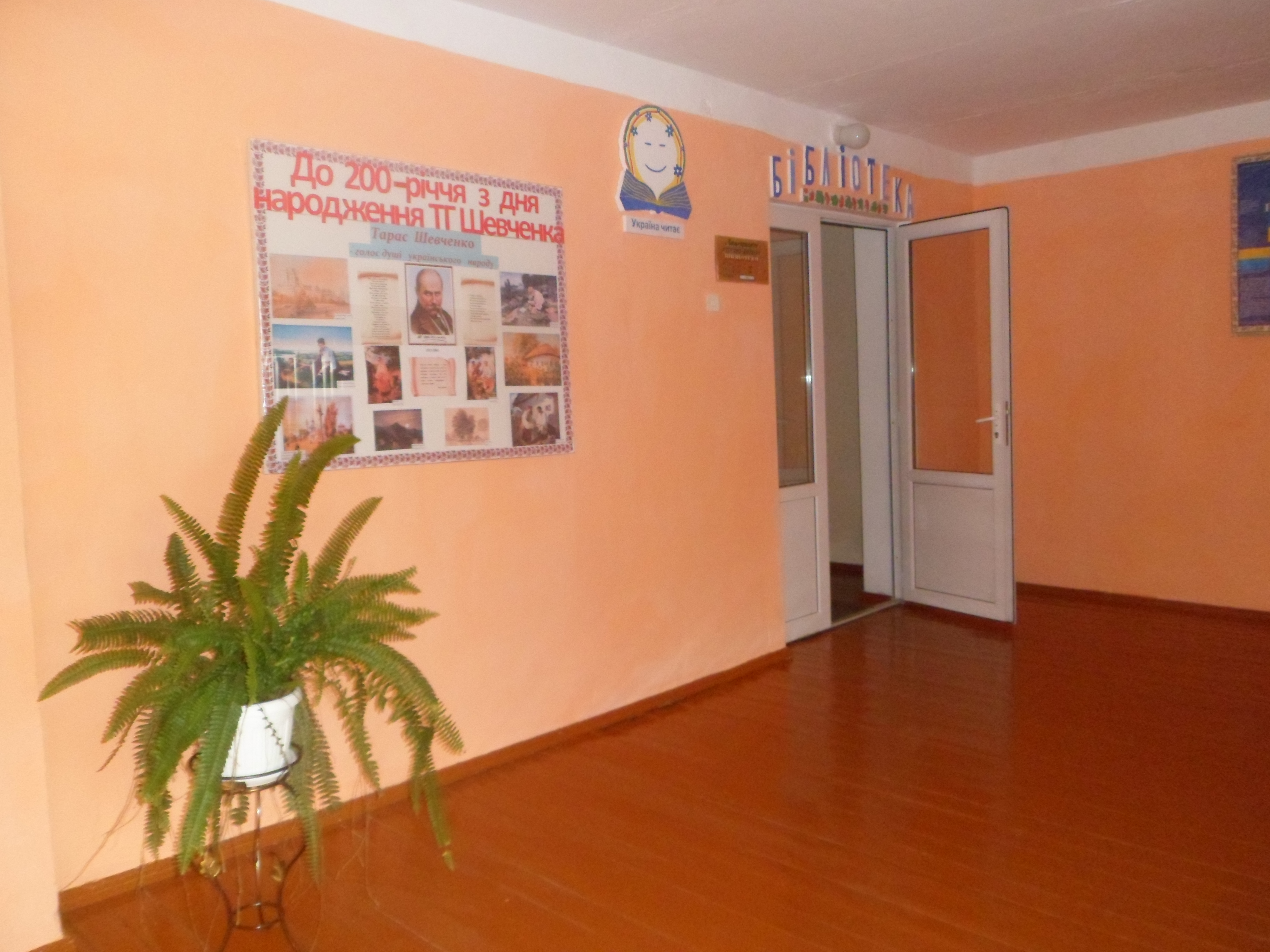 Вхід у бібліотеку